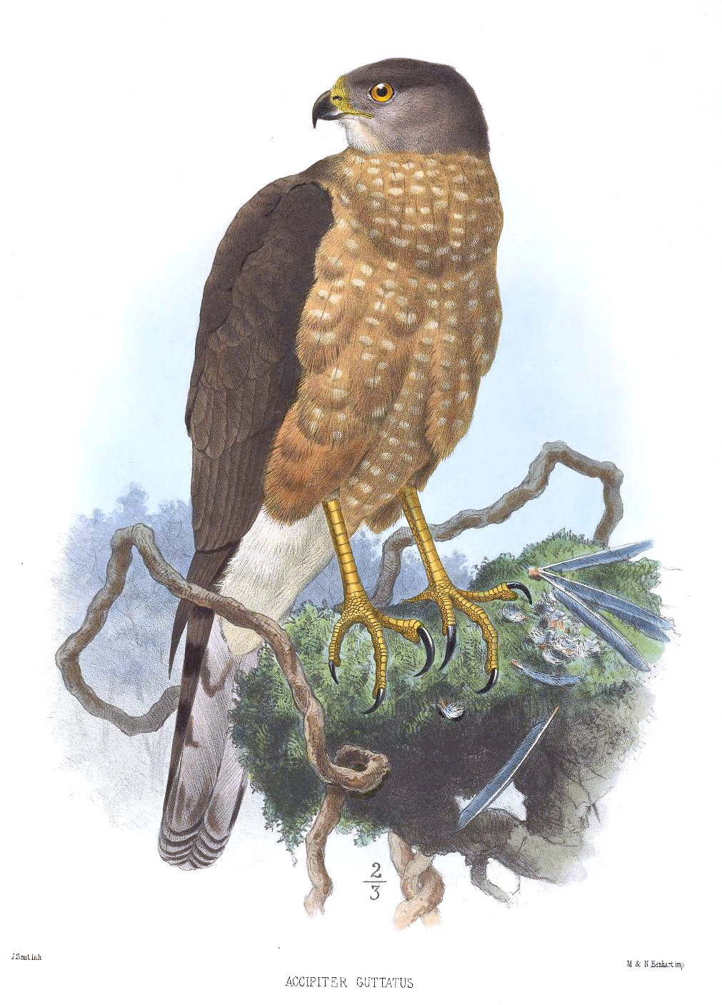 Accipiter guttatus Sclater & Salvin, 1867 = Accipiter bicolor guttata Hellmayr, 1917 (ref)